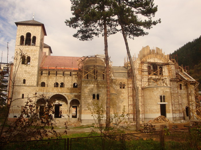 Храм_Светог_саве_у_Фочи